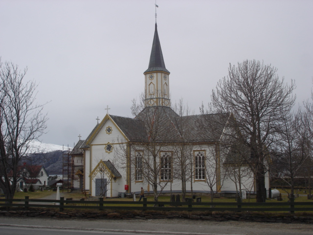 Sandnessjøen kyrkje